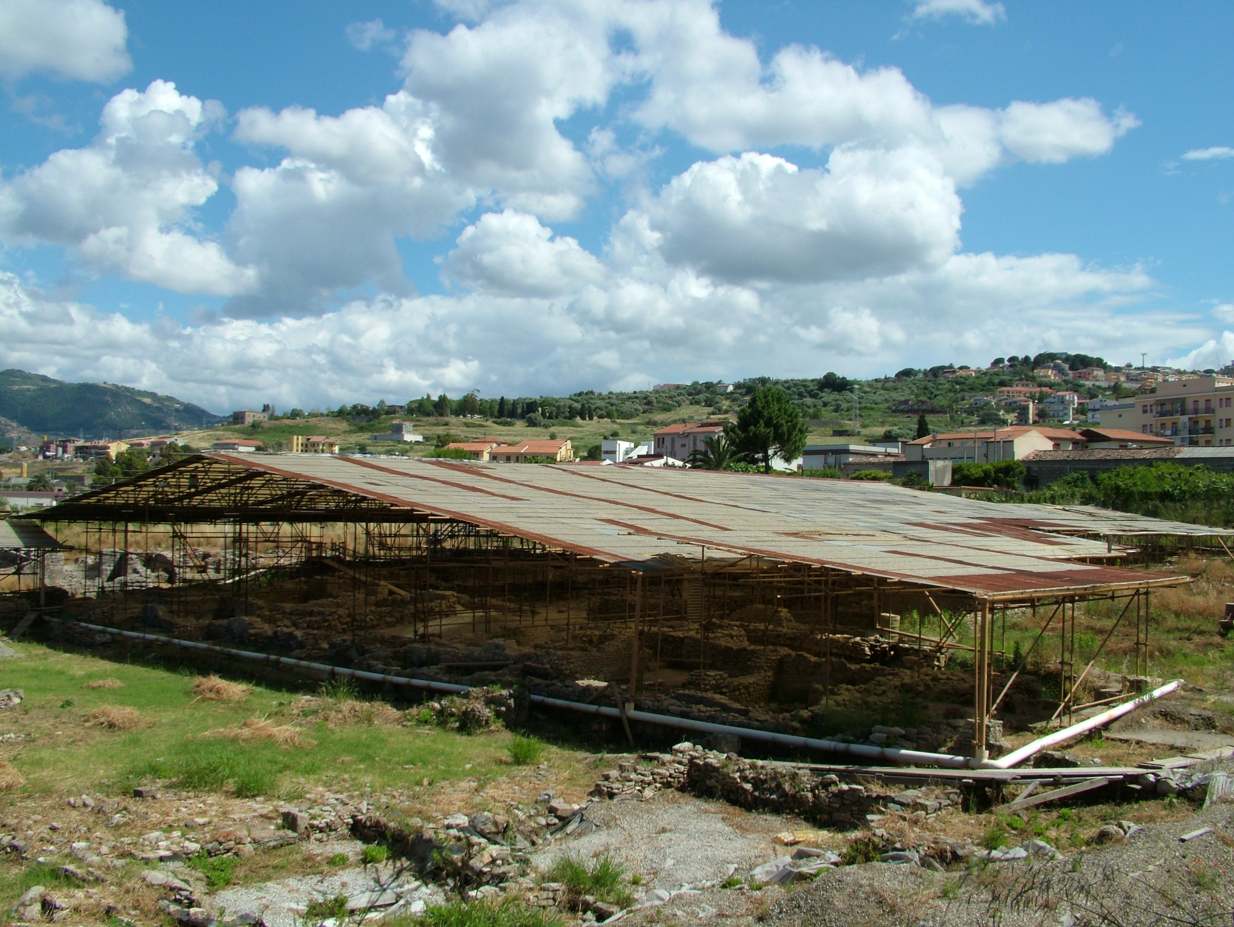 Patti, Provinz Messina, die Ausgrabungsstätten einer römischen Villa